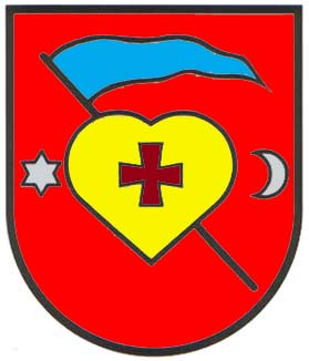 Герб смт Батурин